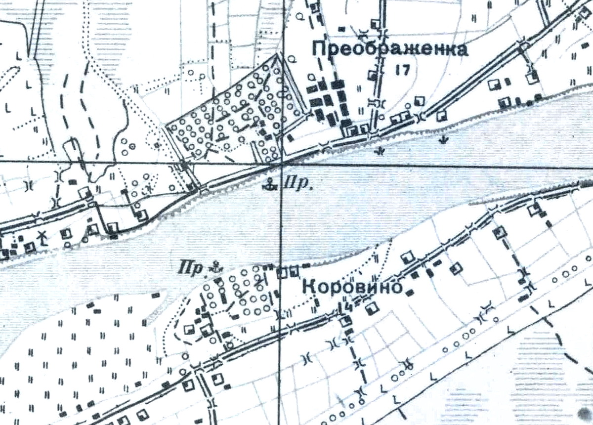 Топографическая карта Ленинградской области, квадрат О-35-21-А-б (Бол. Куземкино), посёлок Преображенка.